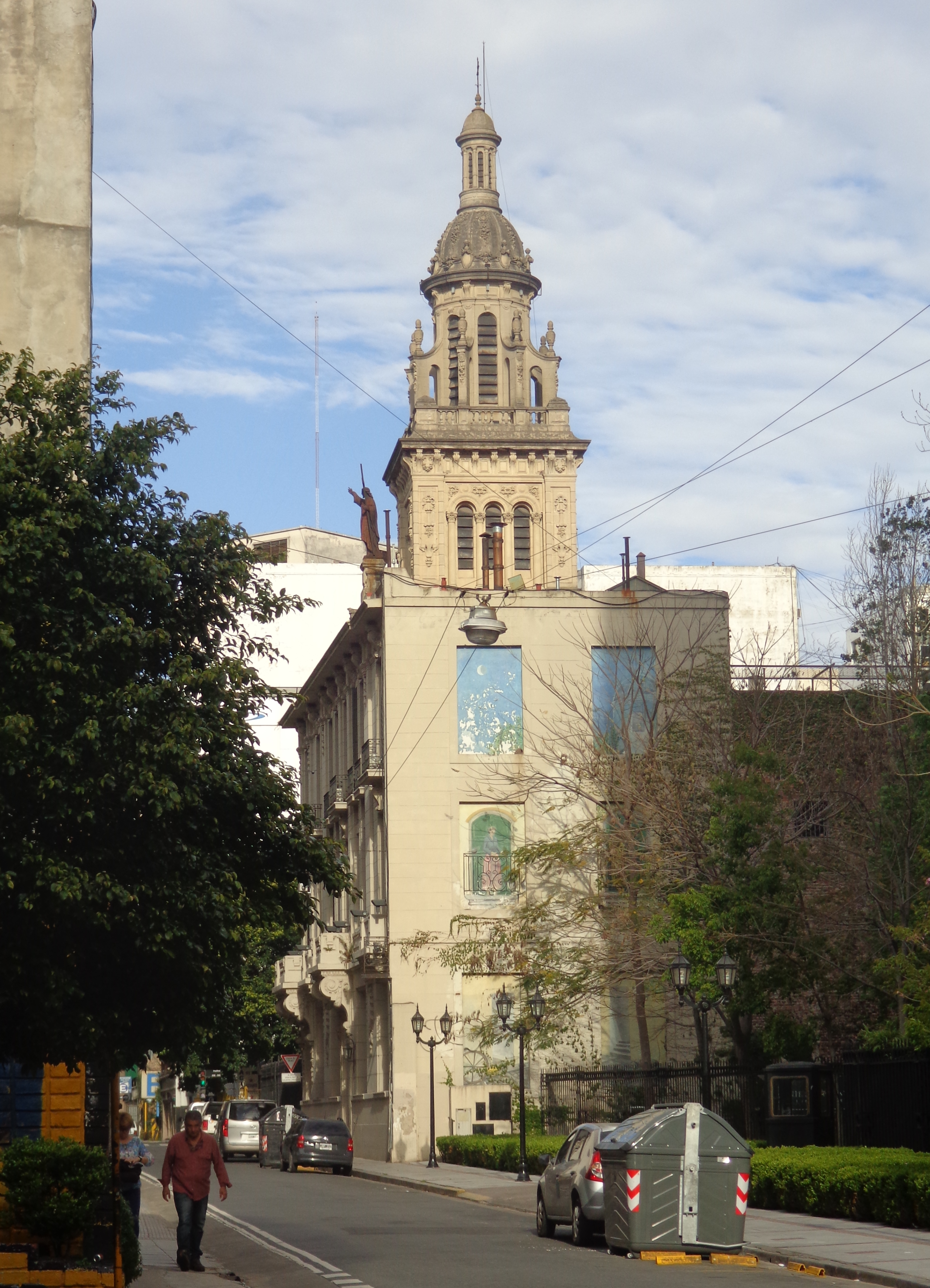 Conocida a fines del siglo XIX como "San Juan de los franceses", por ser frecuentada por la comunidad francesa de Buenos Aires, es una iglesia católica ubicada en la calle Alsina, esquina Piedras, en el barrio de Monserrat, en Buenos Aires, Argentina.